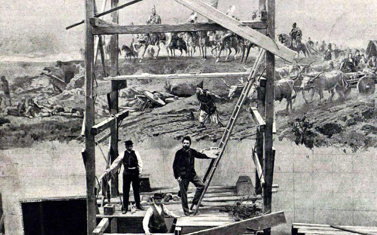 Feszty Árpád és munkatársai a körkép festése közben. Erdélyi Mór felvétele